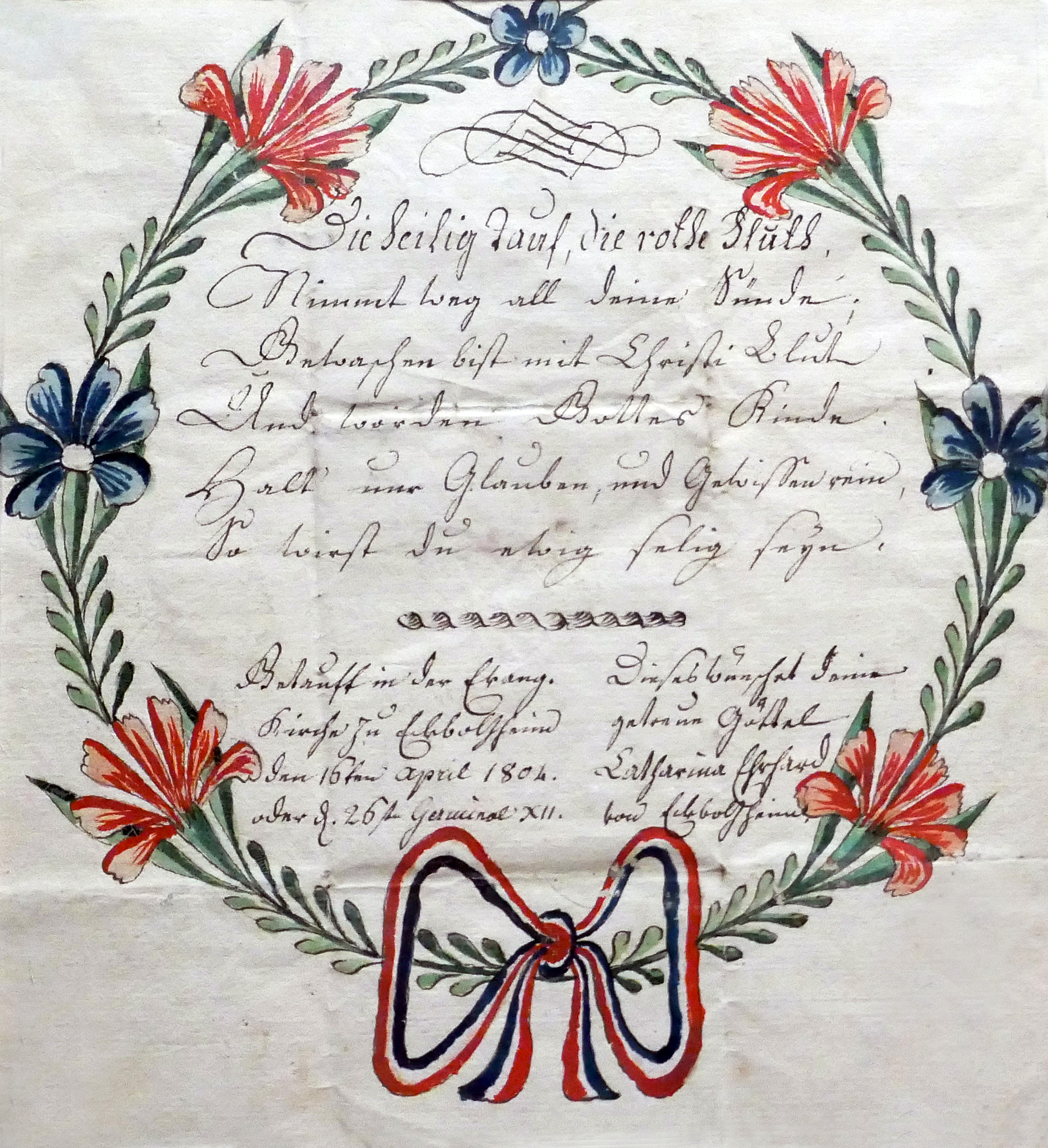 Lettre de baptême républicaineEckbolsheim, 1804, an XII de la République. Exposition Vies protestantes : le mot et l'image au Musée alsacien de Strasbourg (2017).